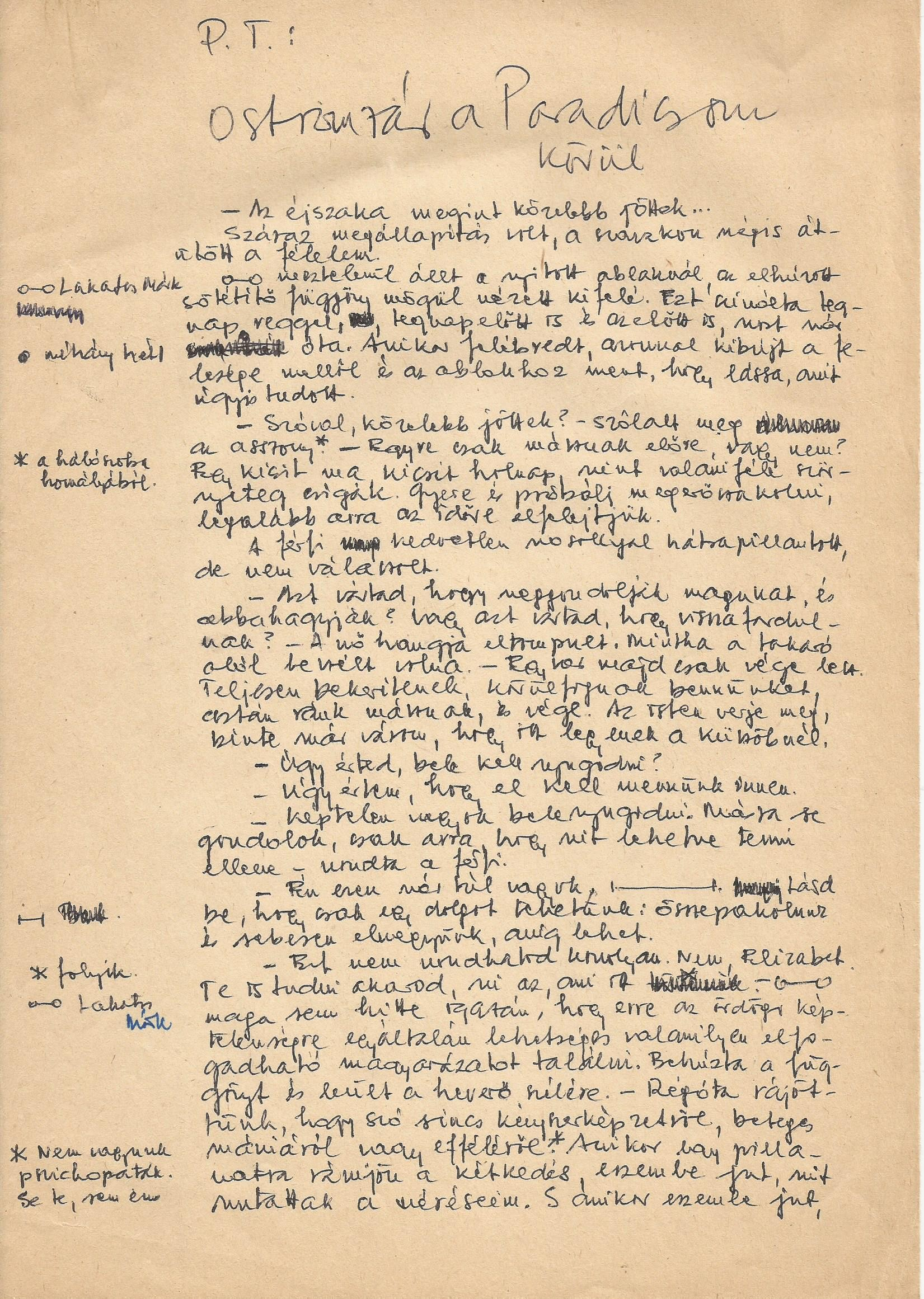 Ostromzár a paradicsom körül - Pintér Tamás kézirata